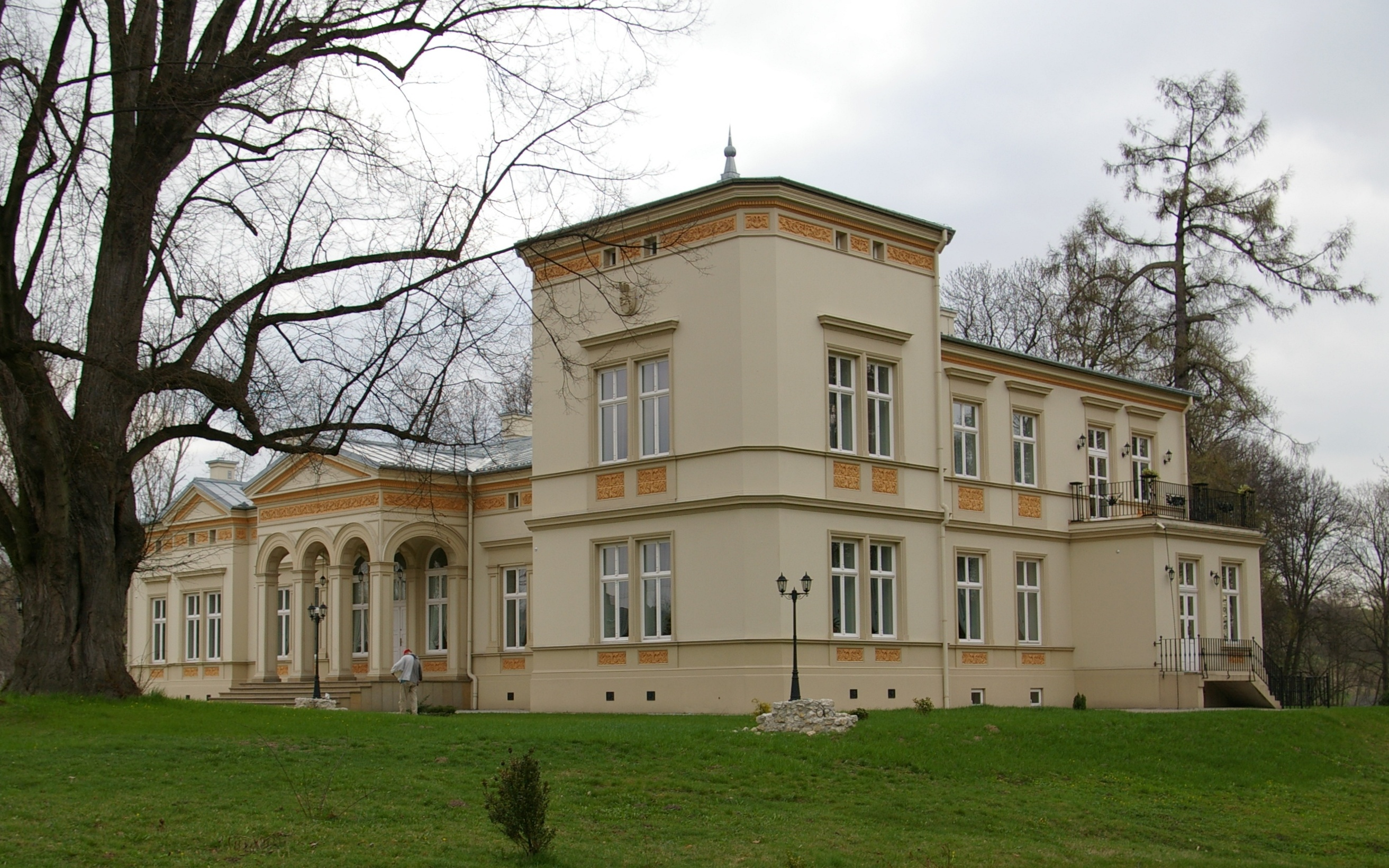 Pałac Wężyków w Minodze